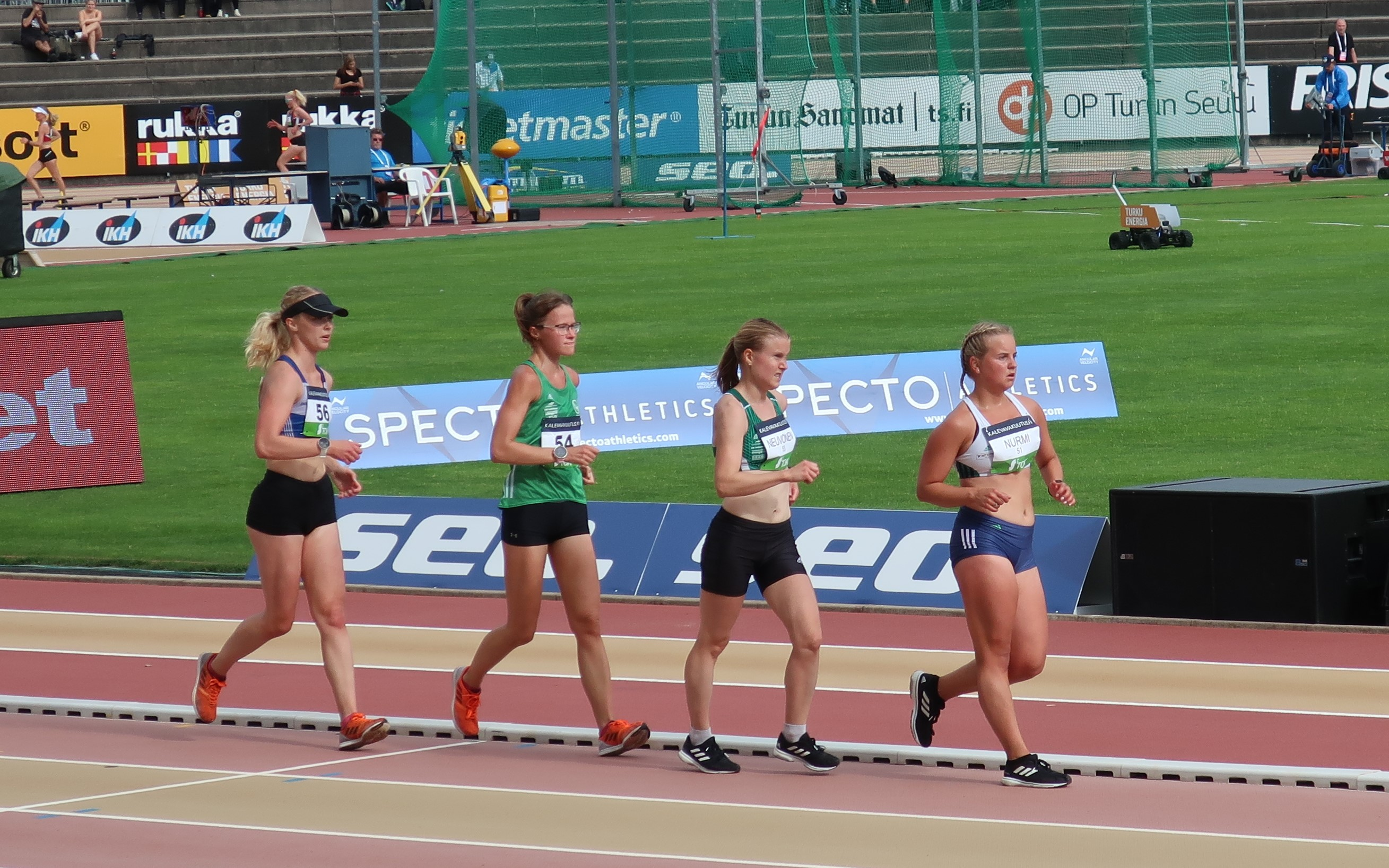 Naisten 10 000 metrin kävelyn kärkinelikko Paavo Nurmen stadionilla Turussa vuoden 2020 Kalevan kisojen avauspäivänä.